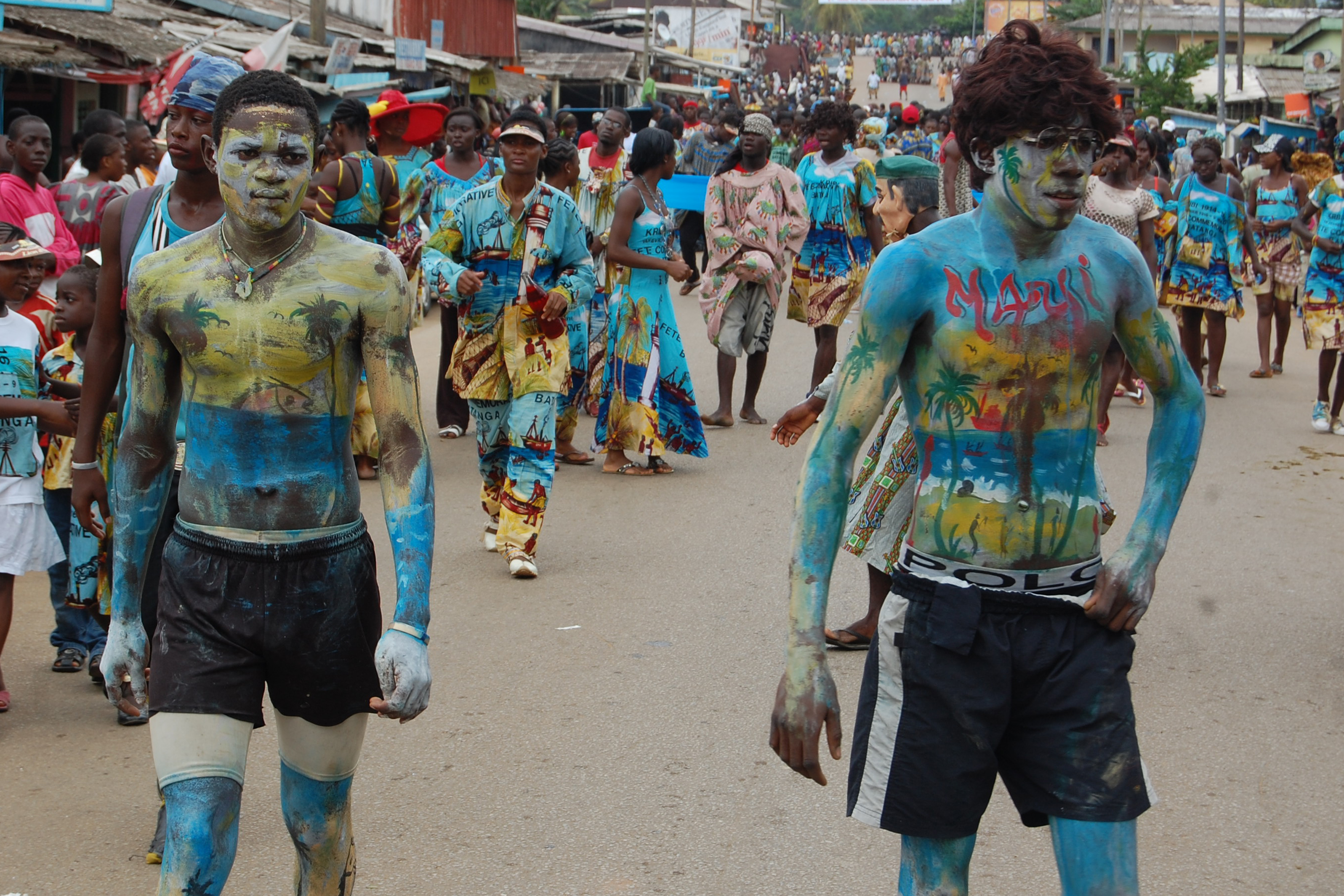 Photo fête traditionnelle du peuple Batanga à Kribi This is an image of Cultural Fashion or Adornment from Cameroon